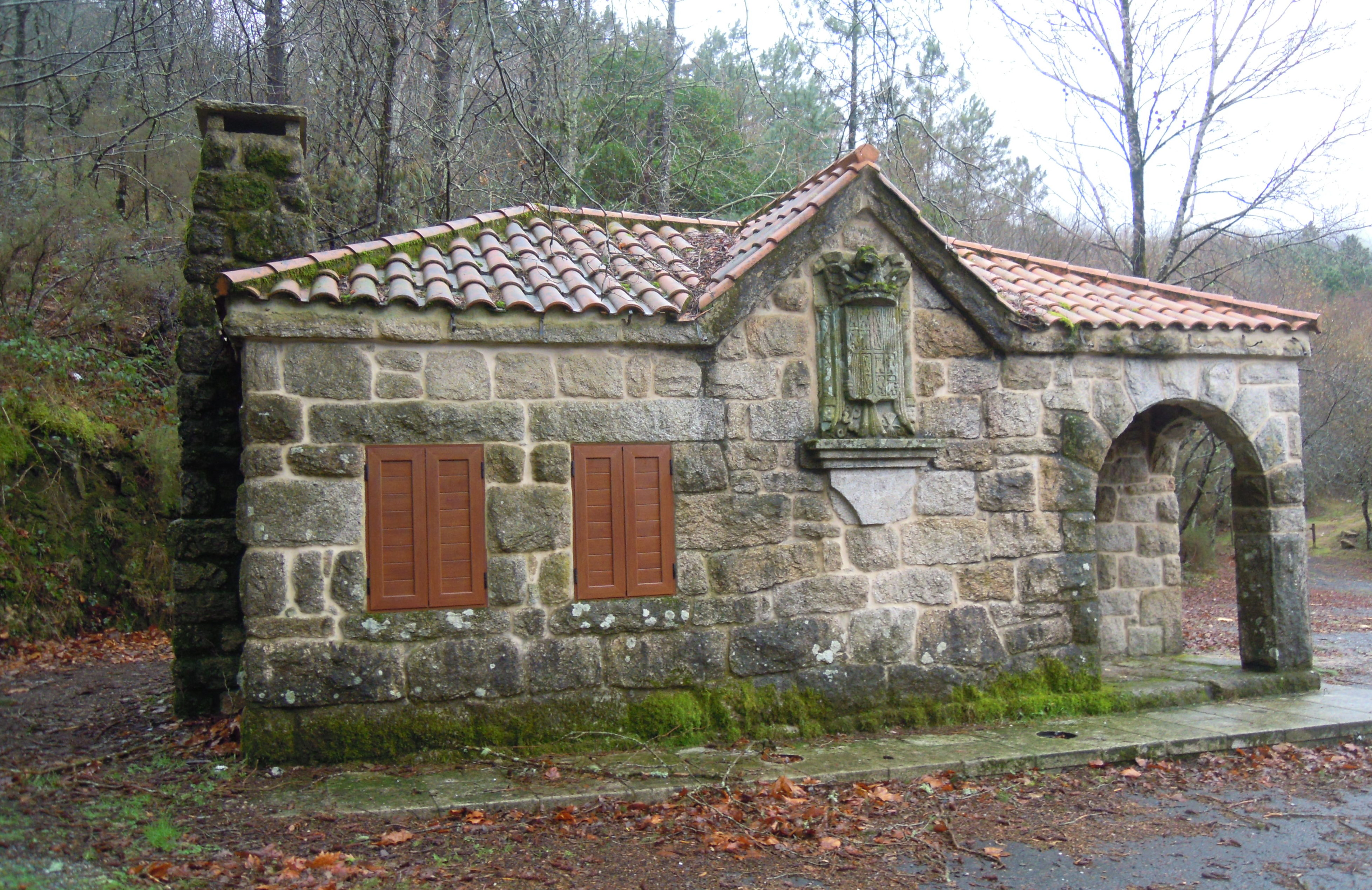 Construción na Portela do Home (Lobios) co Escudo de España coa aguia de San Xoán.